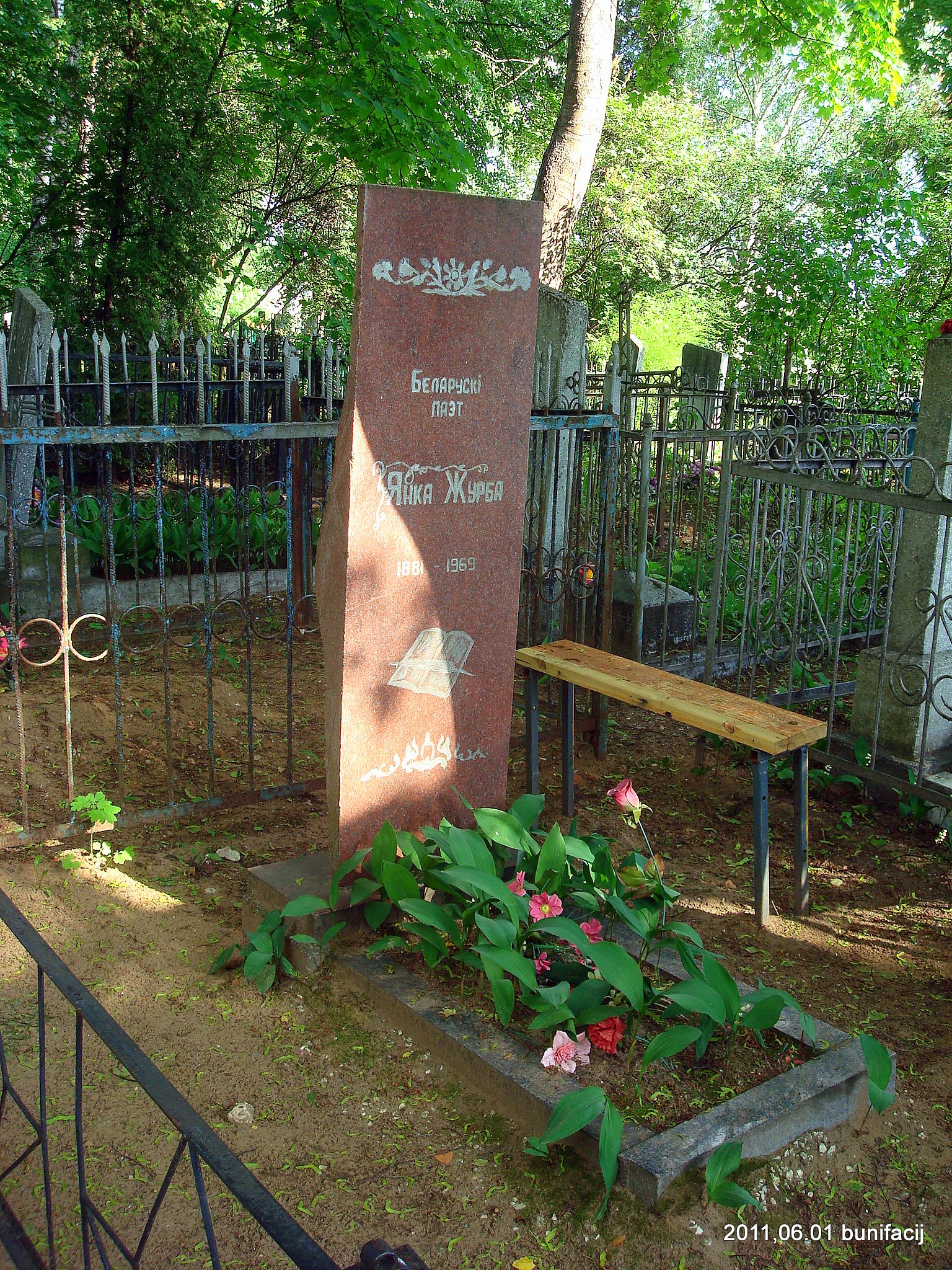 Памятник поэту Янке Журбе